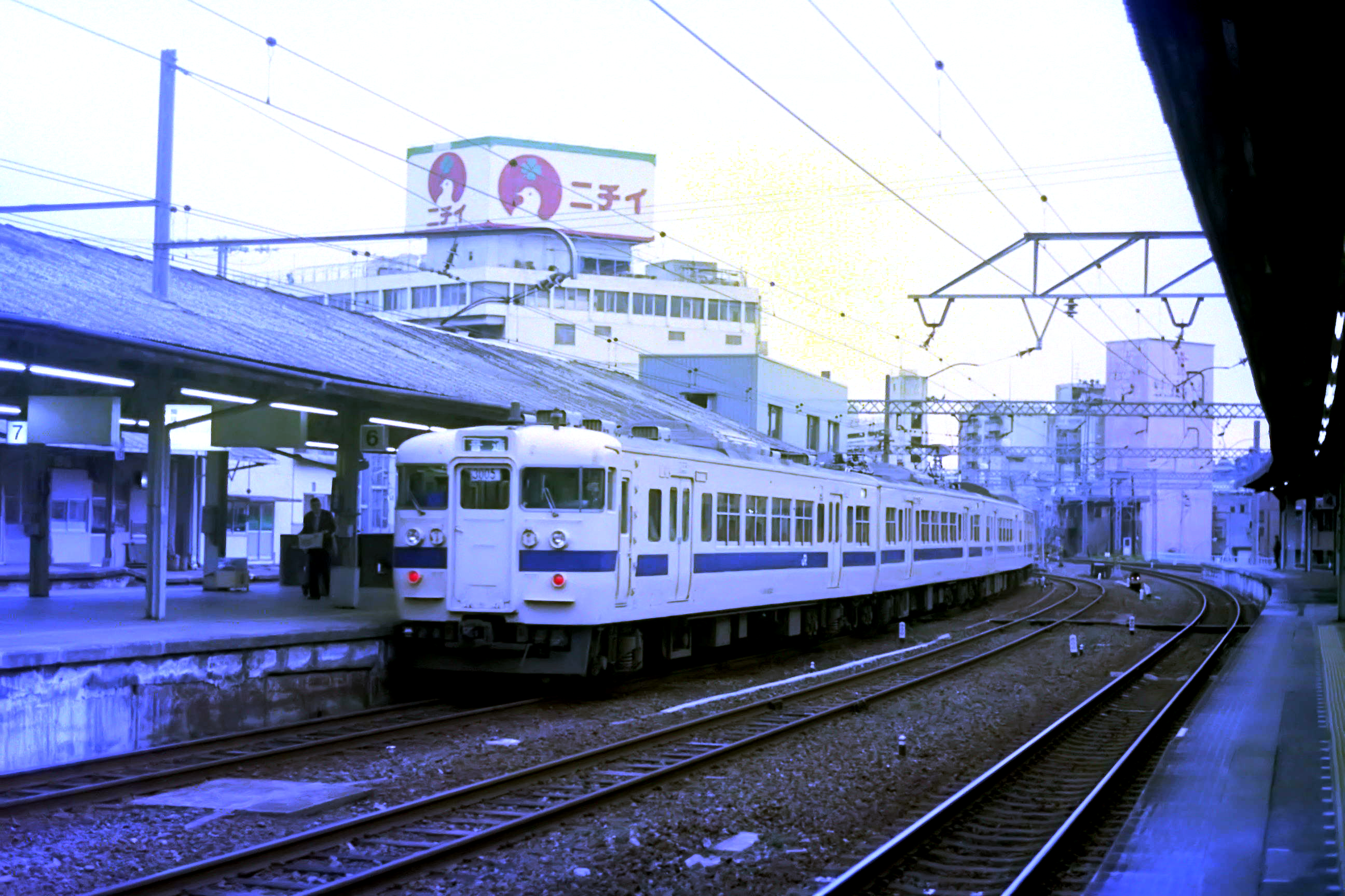 クハ115-3005 下関駅